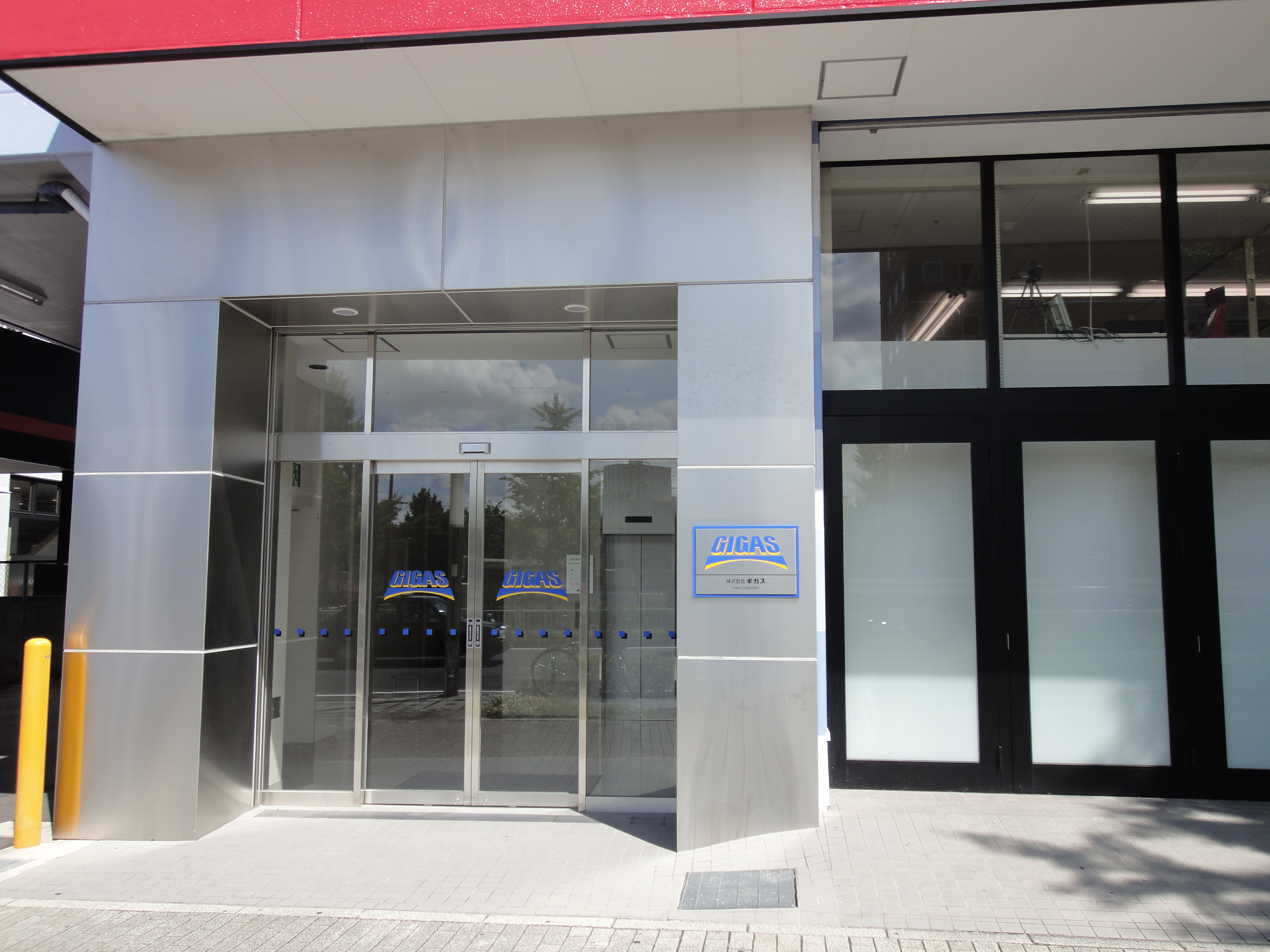 ギガス本社エントランス